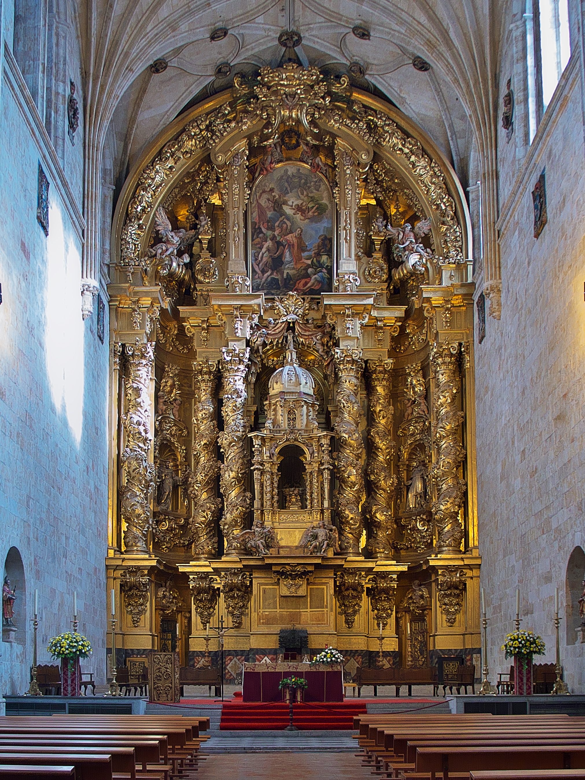 Entre las mejores obras de José Benito de Churriguera (1692). La pintura El martirio de San Esteban es de Claudio Coello.